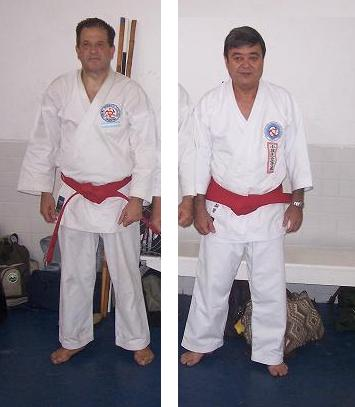 Maestro Héctor Gonzalez Ceballos de Argentina y Maestro Masahiro Shinzato de Brasil, recién promovidos ambos a 9° Dan de Karate-Do